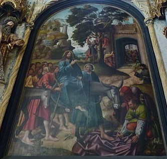 "Entrada de Jesus em Jerusalém" pintura de Jorge Afonso que fez parte do Políptico da Charola do Convento de Cristo